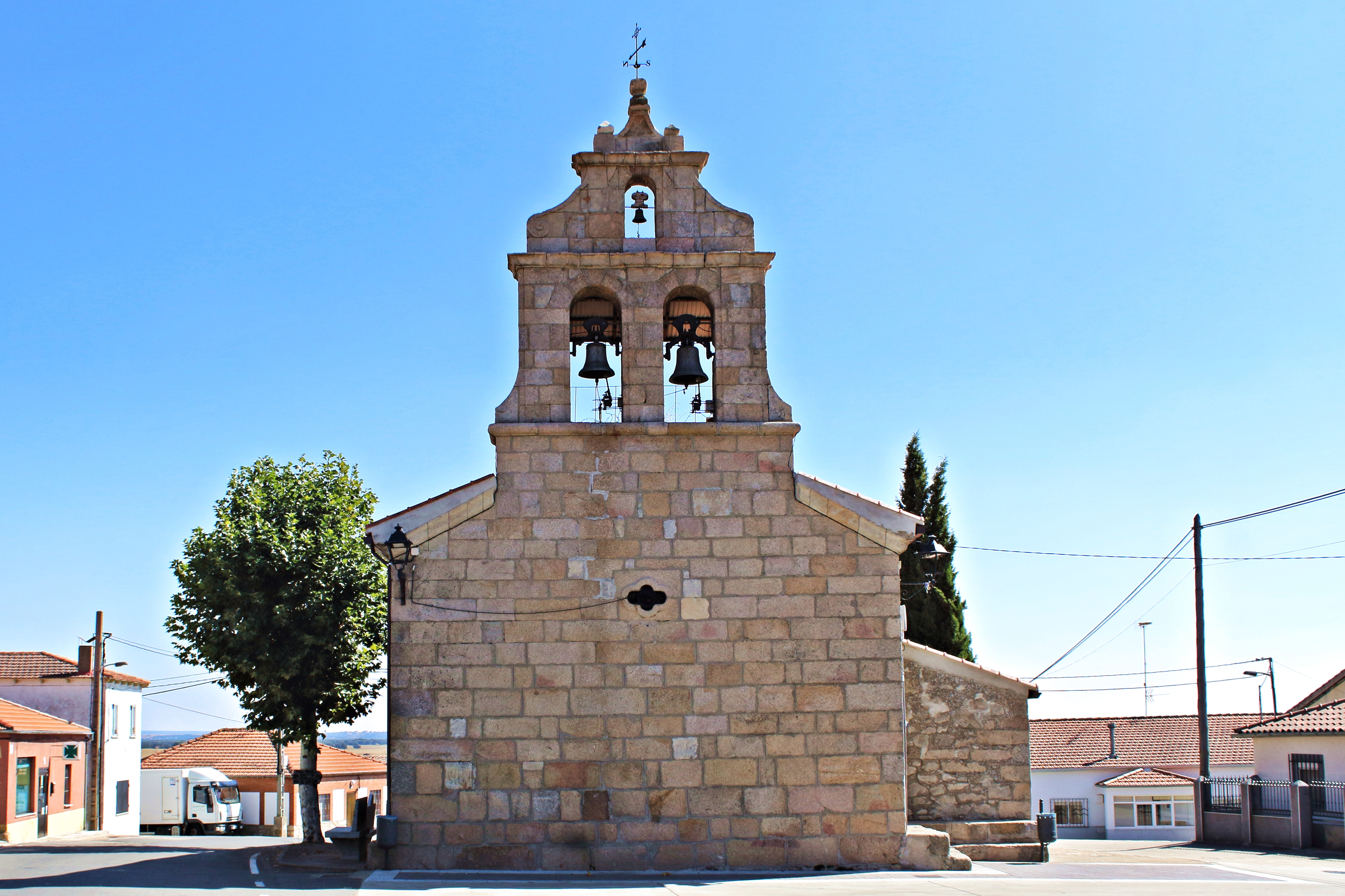 Boada, provincia de Salamanca